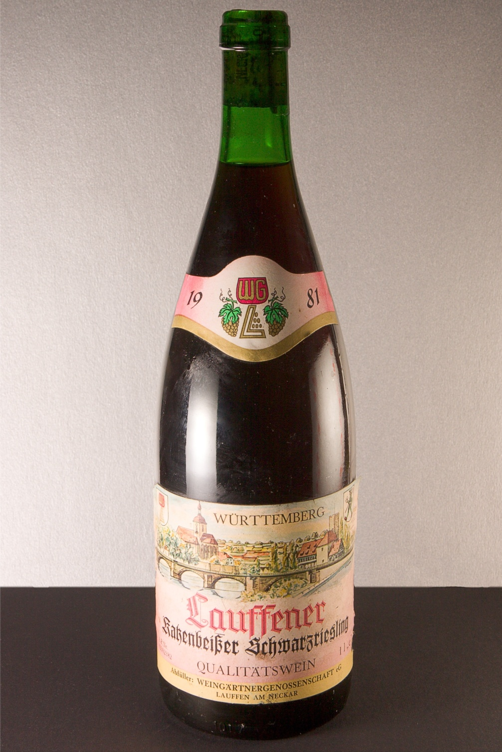 Katzenbeißer